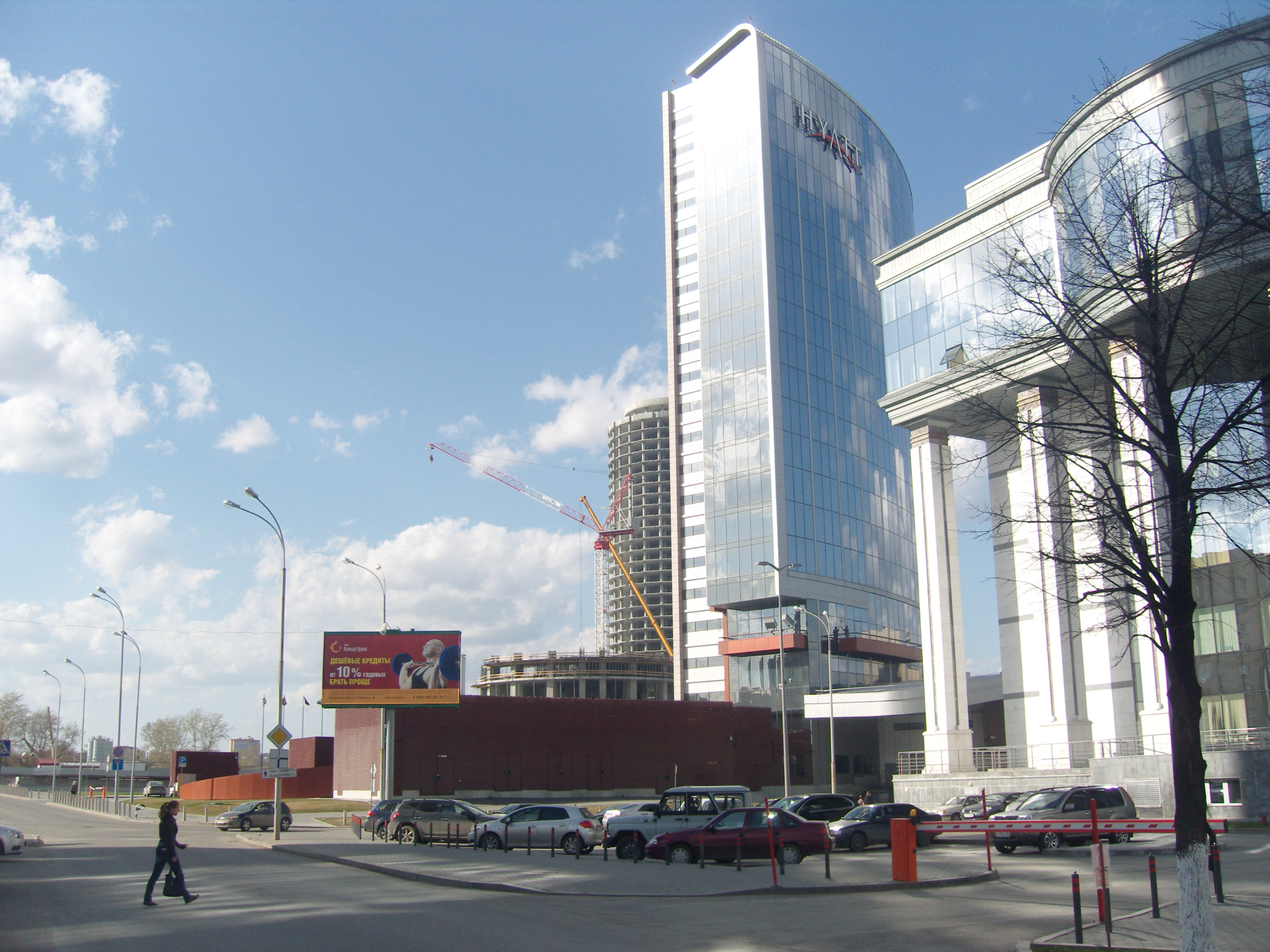 Законодательное собрание Свердловское области и гостиница "Хайятт".